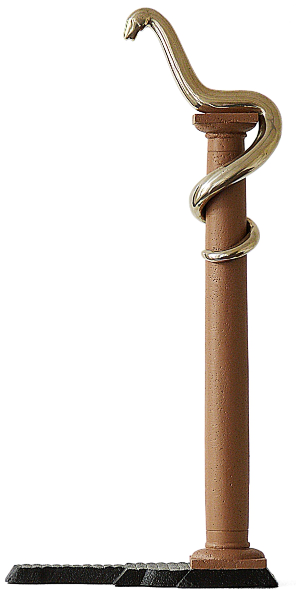 Rekonstruktion der ehemaligen - wahrscheinlich Mollerschen - Schlangenkandelaber in Darmstadt. Bemalte Aluminiumguss-Skulptur von Gerhard Roese, 2005, Privatbesitz